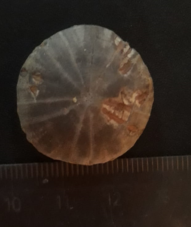 Holectipus planatus es una especie fósil de la Formación Agrio, miembro agua de la mula.